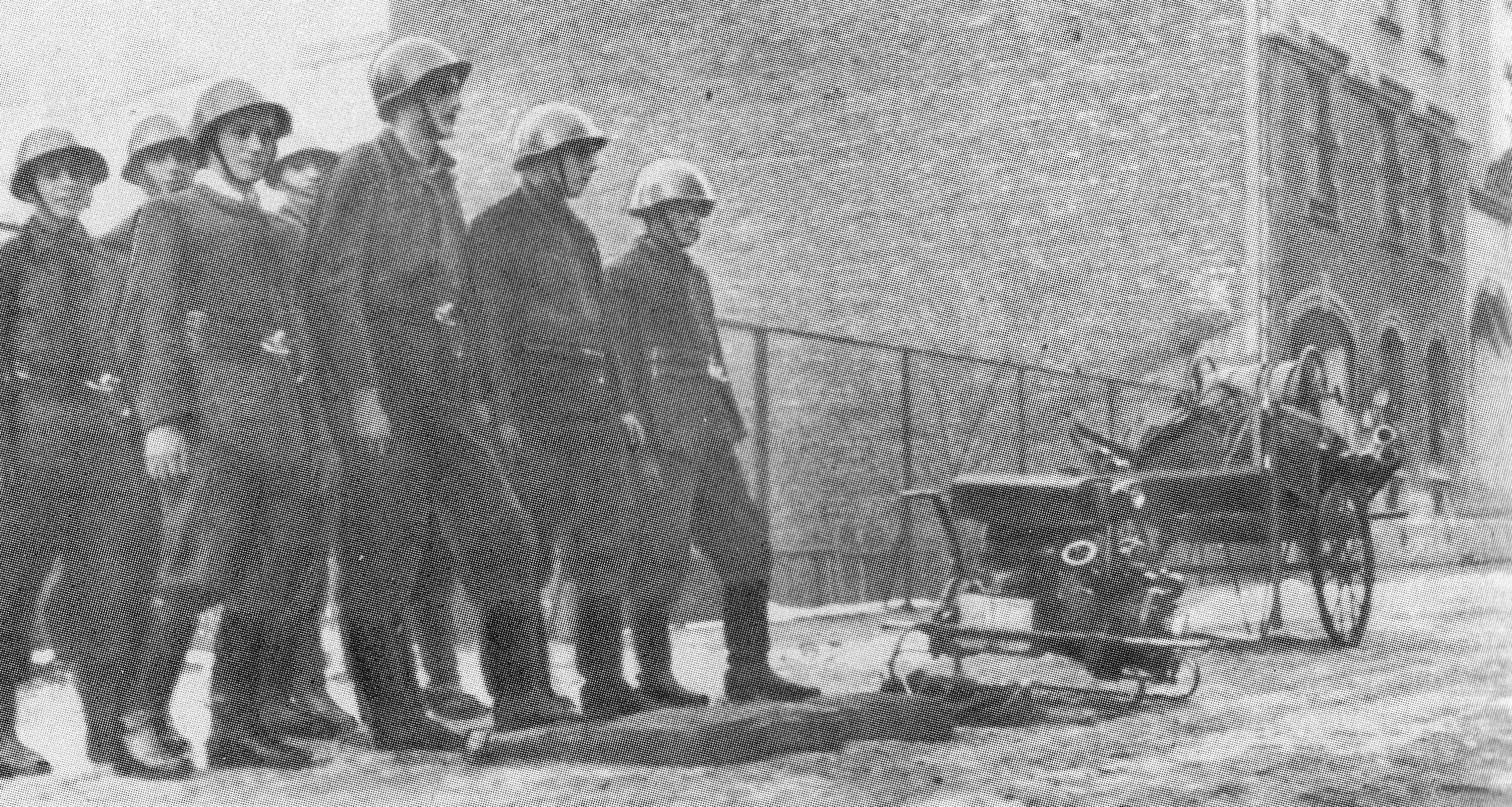 Maciej Aleksy Dawidowski na zbiórce drużyny przemysłowej straży pożarnej Fabryki Fuchsa w Warszawie